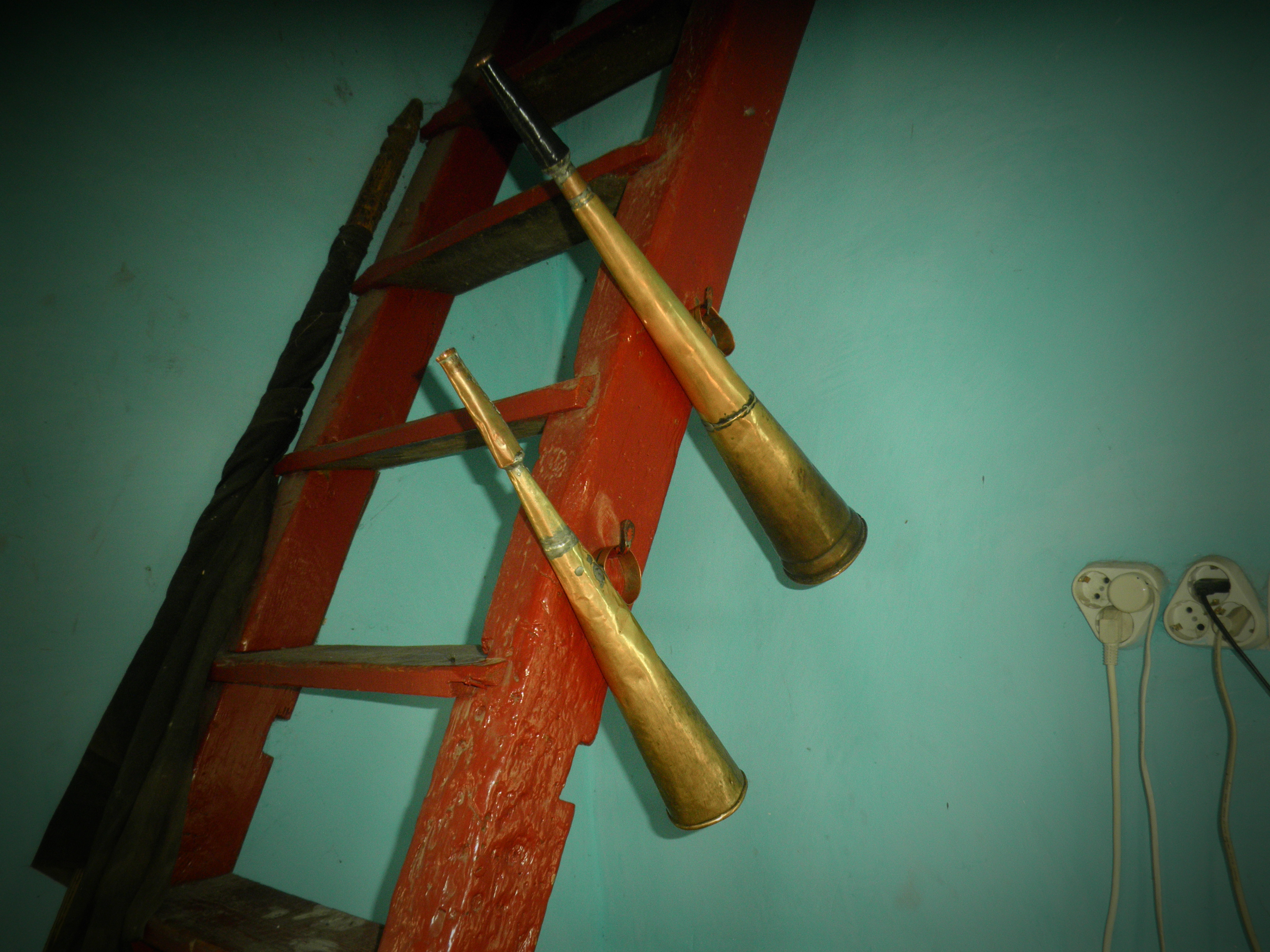 trubačovy pomůcky na věži evangelického kostela